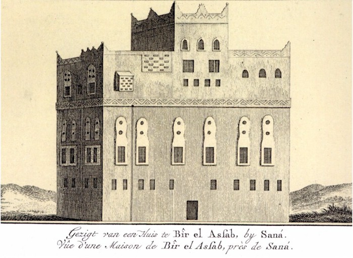 Haus im Garten-Vorort Bir al-Azab von Sana'a (Jemen)